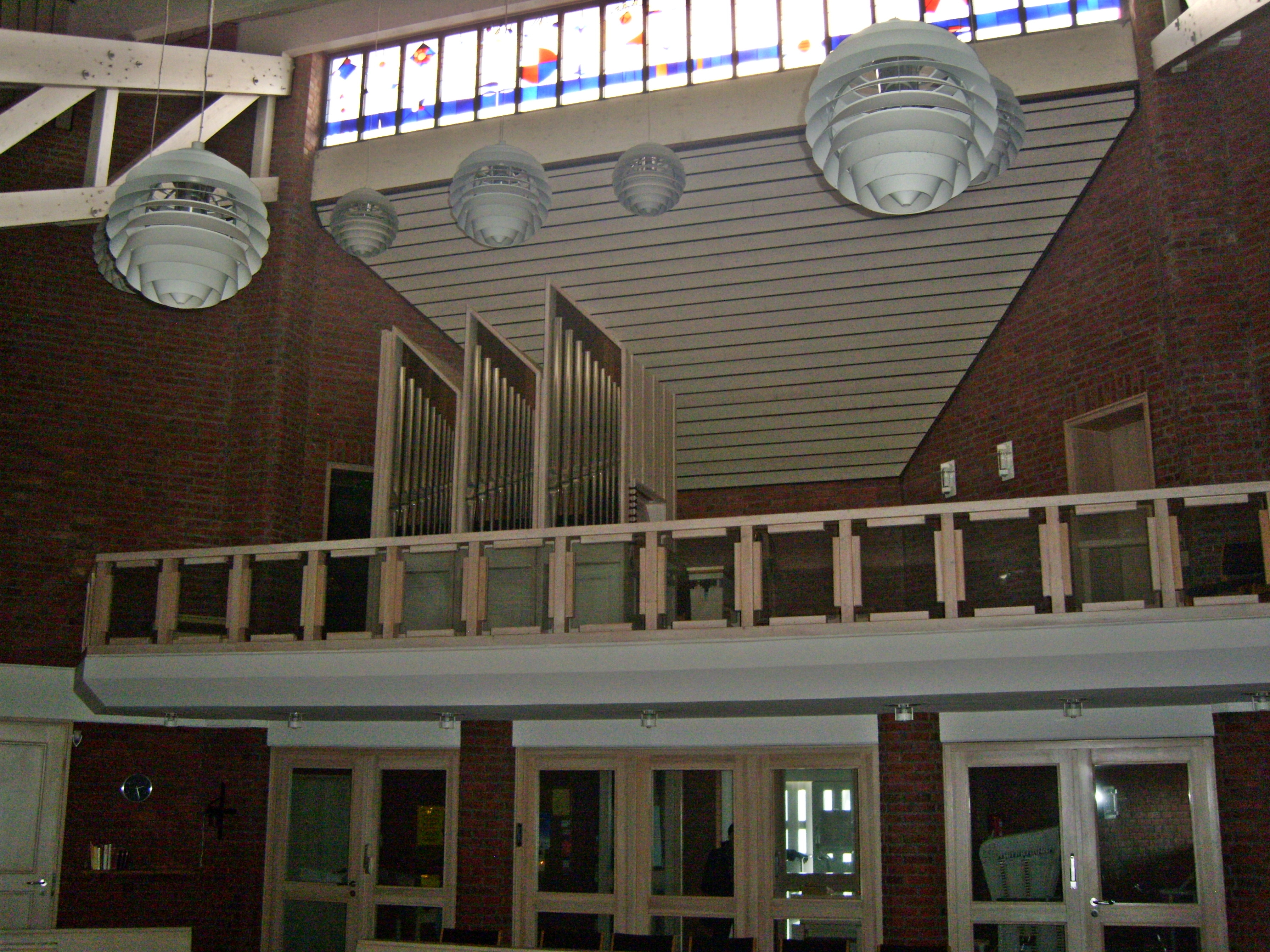 St. Raphael Sylt , Blick auf die Orgelempore